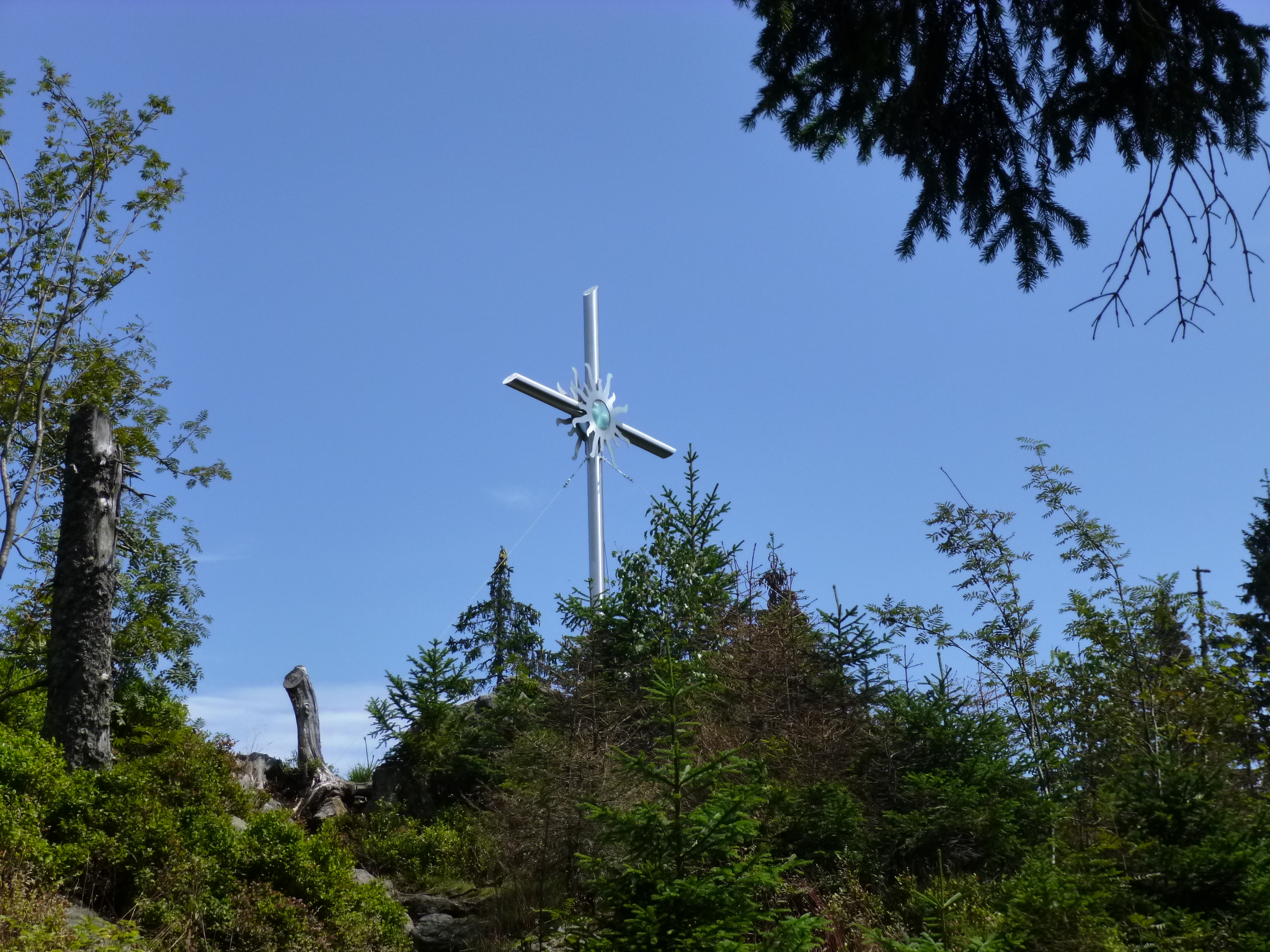 Das Metall-Gipfelkreuz am 1238 m hohen Schwarzeck, einem Gipfel auf der Wanderroute vom Kaitersberg zum Großen Arbergipfel